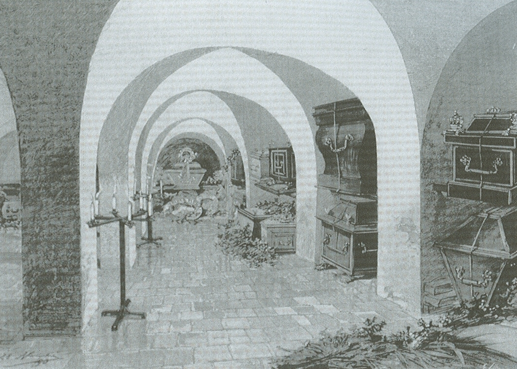 Afbeelding gepubliceerd in 1890